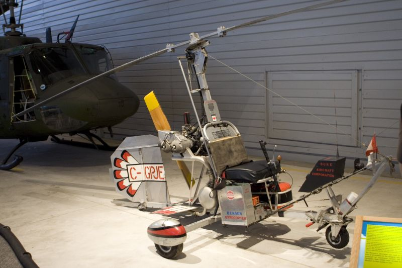 Bensen B-8MG Gyrocopter